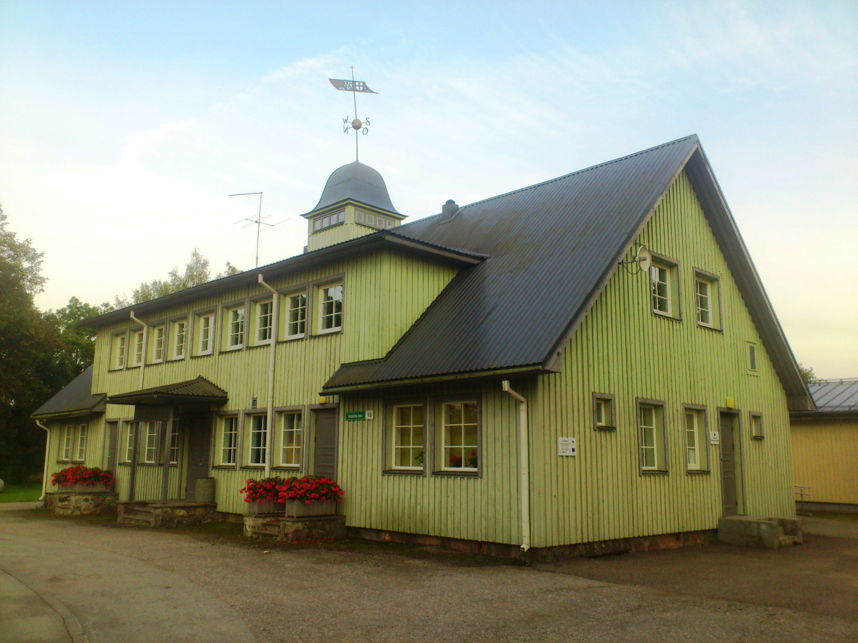 Народный дом в Хагери.